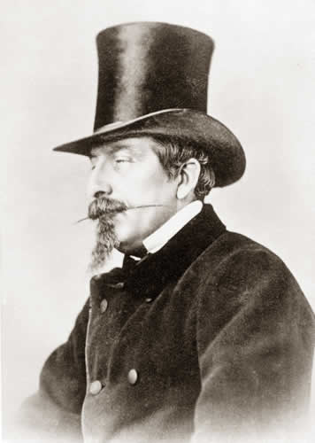 Napoléon III, empereur, par Nadar (atelier). Archives Photographiques (Médiathèque de l'Architecture et du Patrimoine)